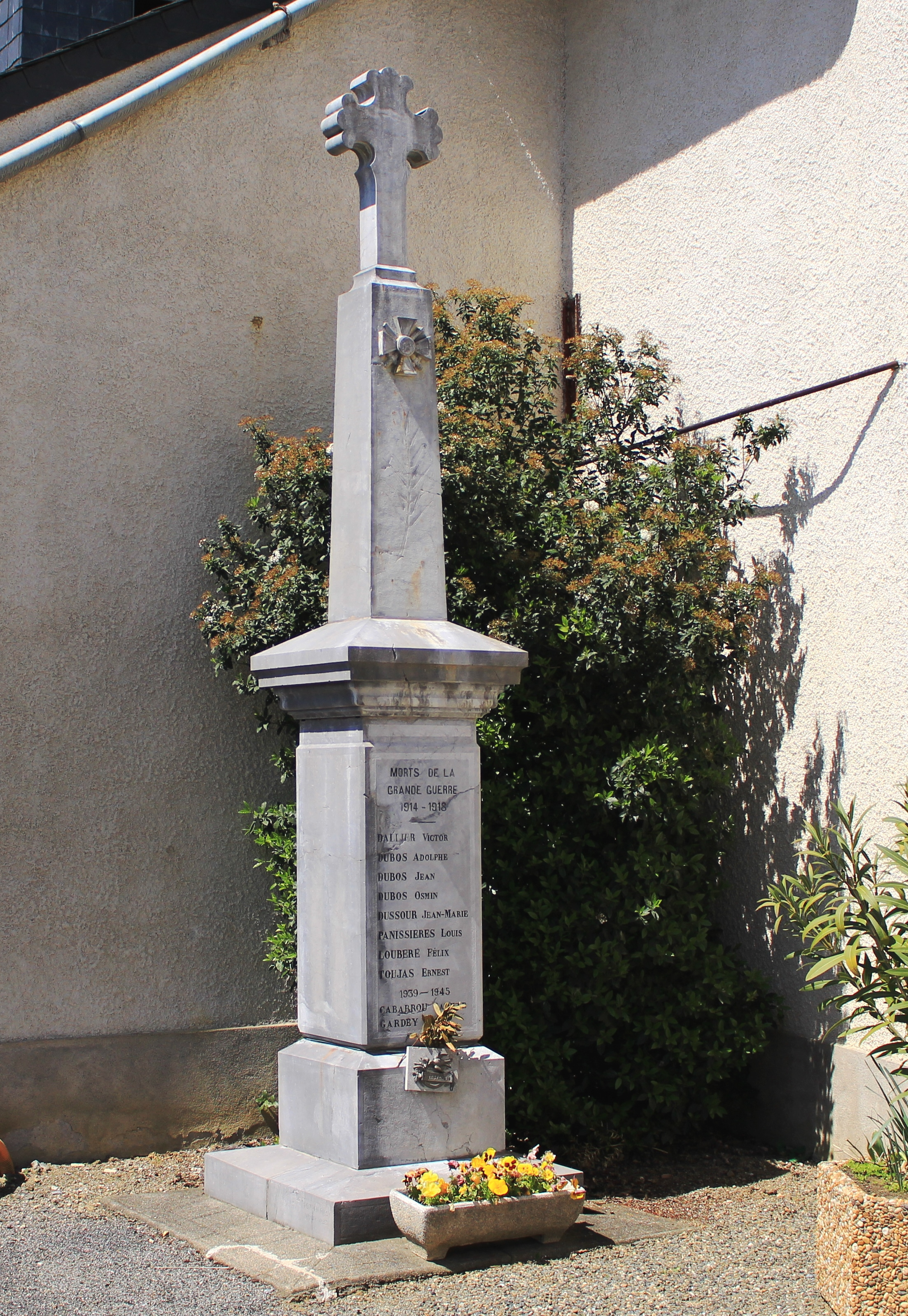 Monument aux morts de Castéra-Lou (Hautes-Pyrénées)